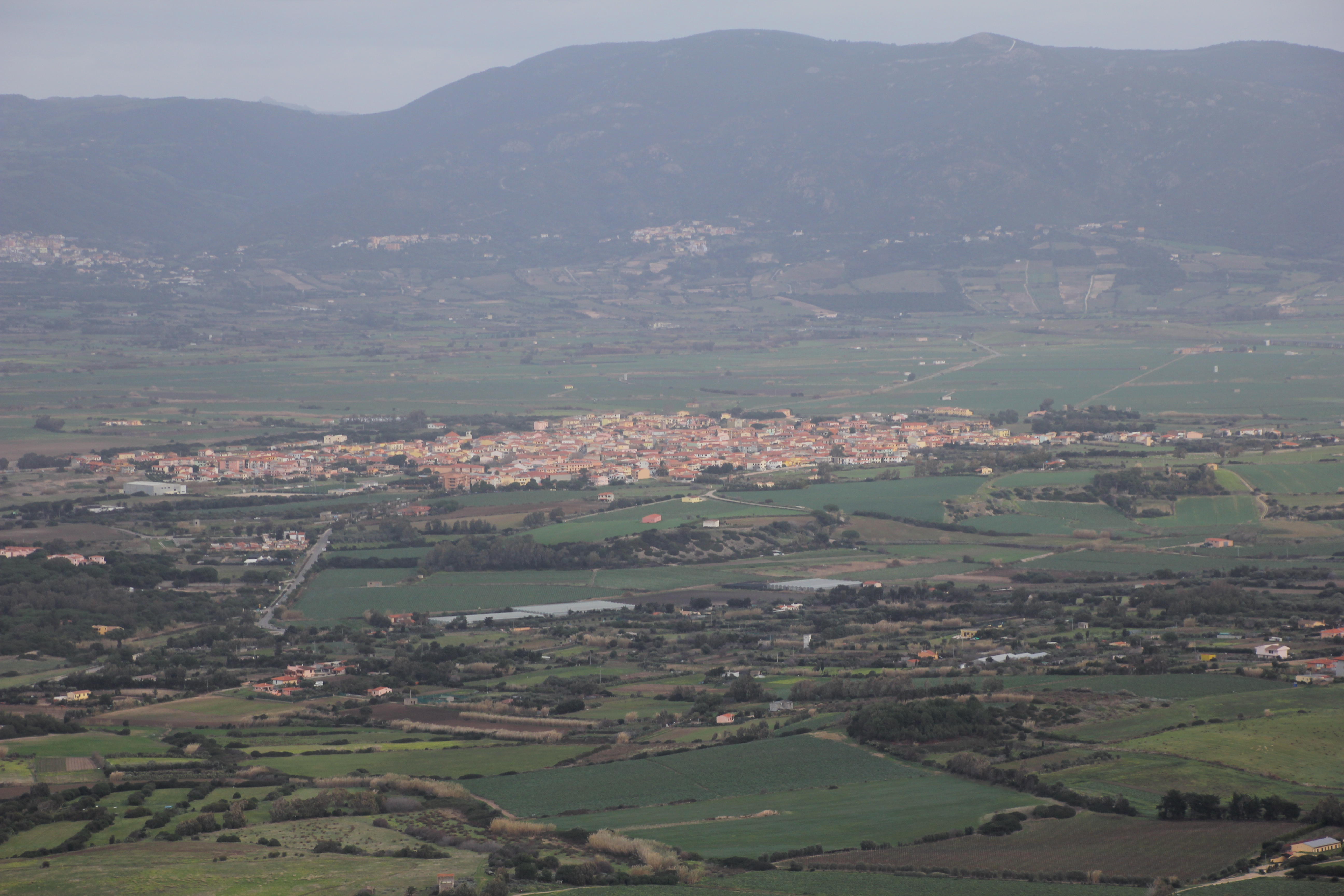 Valledoria (chiamata anche Codaruina)